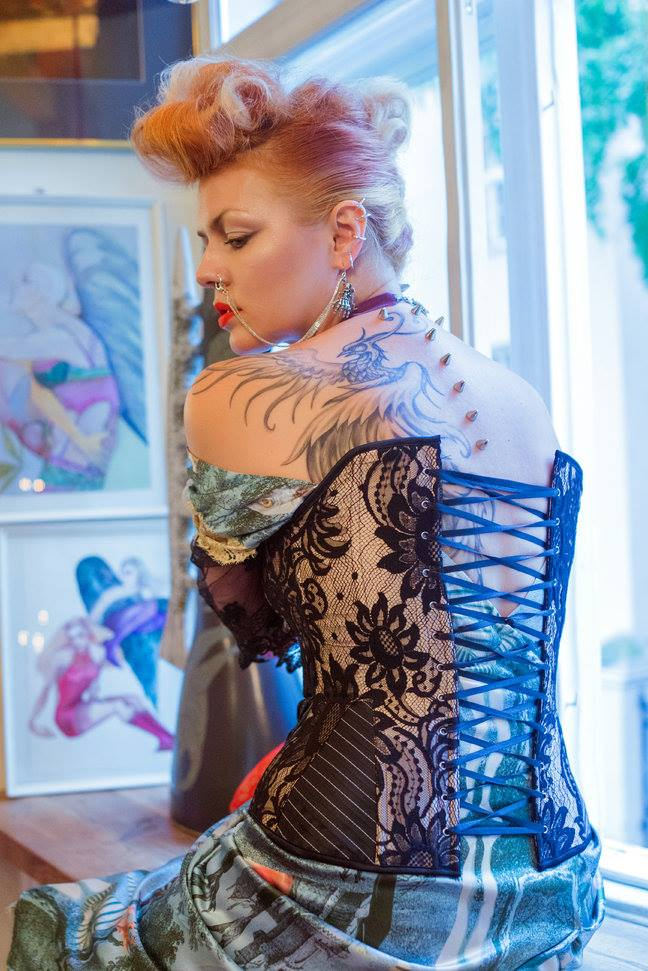 Beatrice Fenice oma kodurestoranis. Beatrice joonistused seinal.